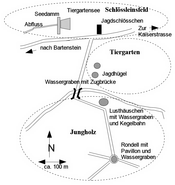 Hohenlohe-Bartensteinischer Lust-und Jagdpark, Jungholz mit Tiergarten und Schlössleinsfeld